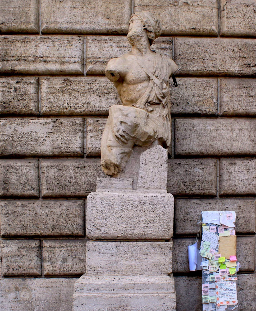 Pasquino nella storia di Roma rappresenta da secoli uno strumento di denuncia sociale contro i potenti e ancora oggi è portatore di tale scopo. This is a photo of a monument which is part of cultural heritage of Italy.